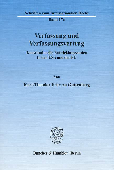 Titelblatt von Verfassung und Verfassungsvertrag. Konstitutionelle Entwicklungsstufen in den USA und der EU. Druckausgabe, Duncker & Humblot, Berlin 2009, ISBN 978-3-428-12534-0.